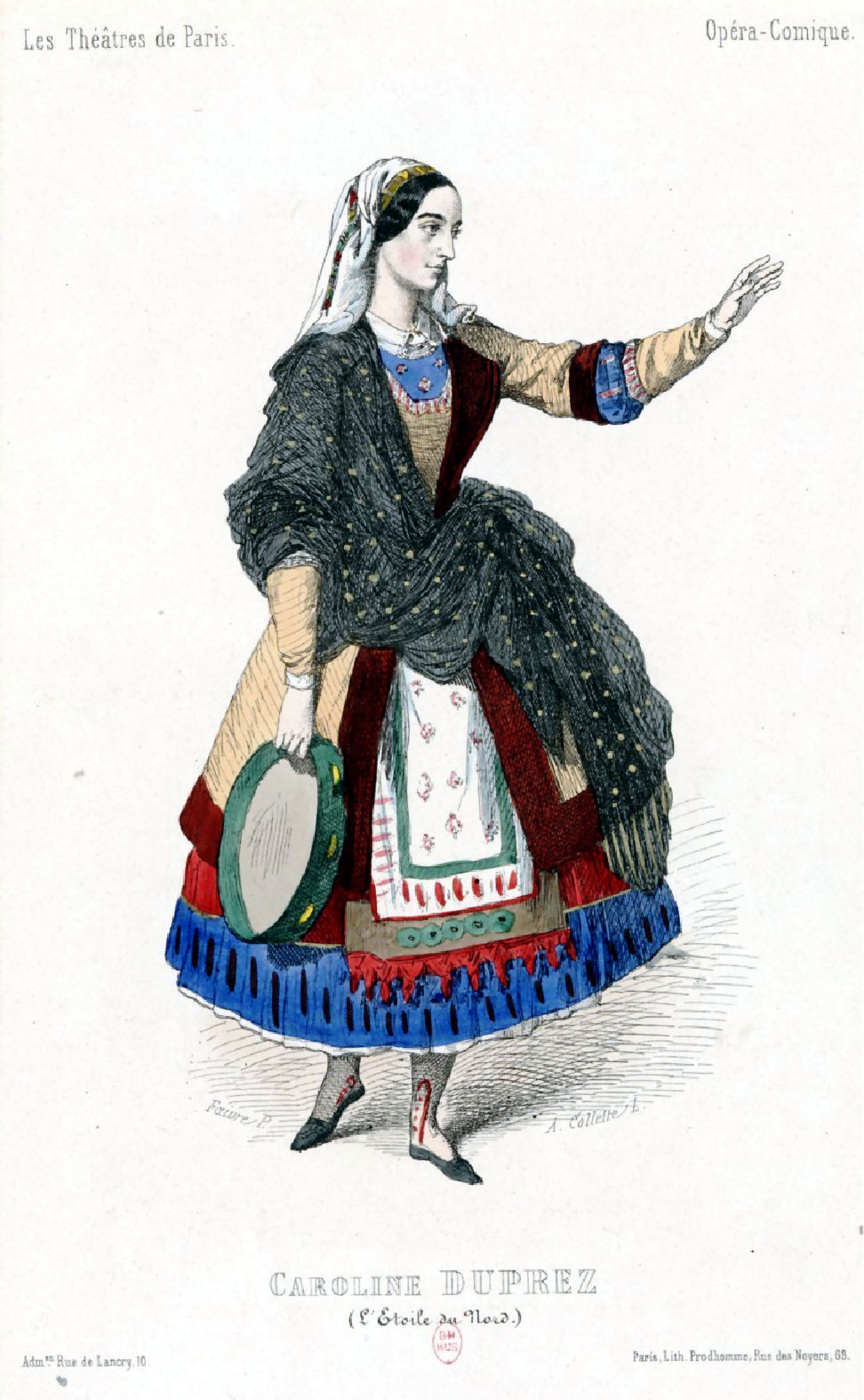 Caroline Duprez dans le rôle de Catherine dans " L'Etoile du Nord " de Meyerbeer à l'Opéra-Comique